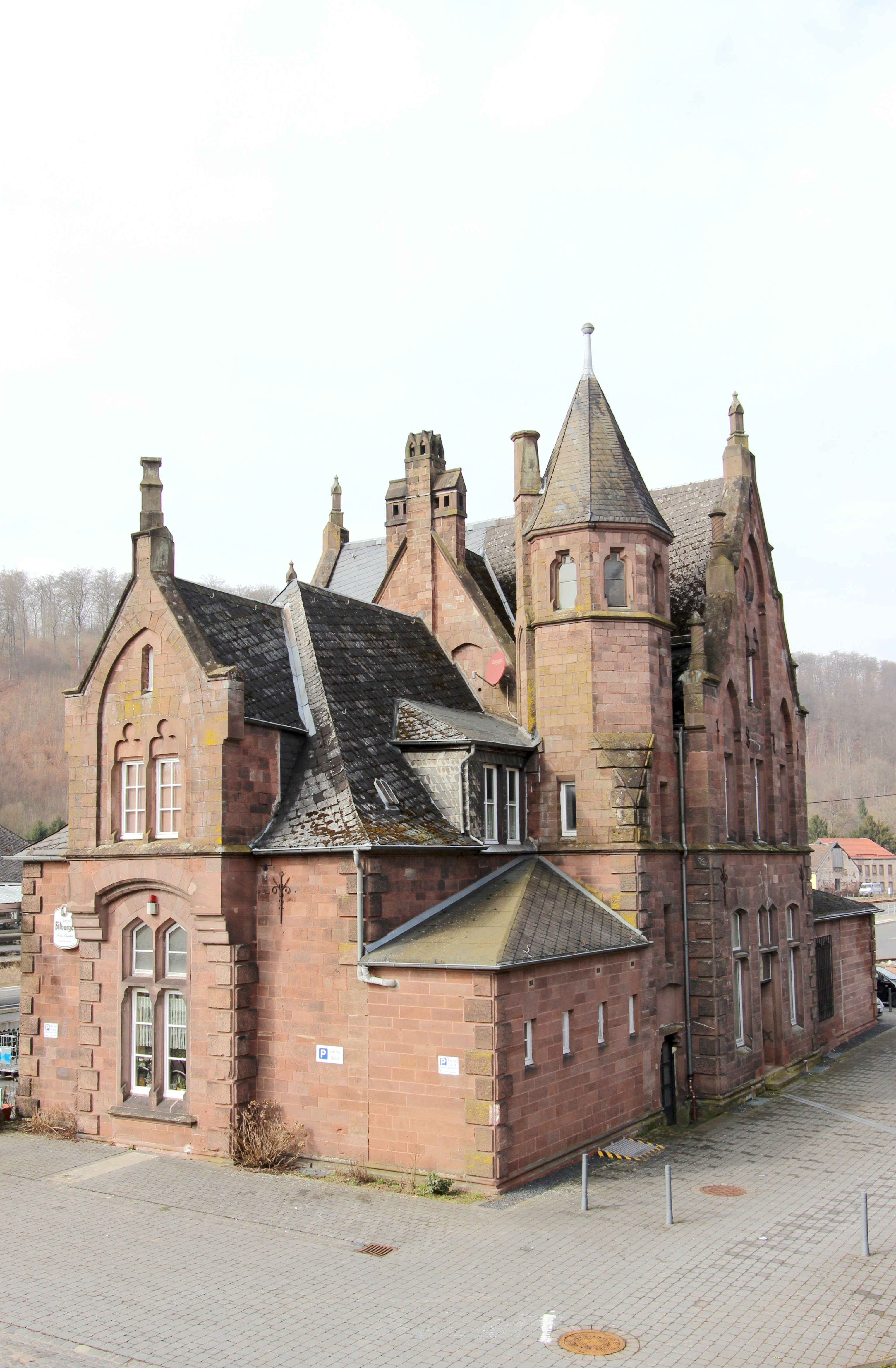 54634 Erdorf, Mainzer Straße 12. Bahnhof Erdorf der Eifelbahn; Empfangsgebäude, malerischer Rotsandsteinbau, teilweise Fachwerk, 1871. Aufnahme von 2018.